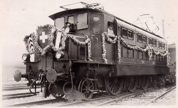 Dekorierte Lokomotive Ae 3/6 I 10693 anlässlich der Eröffnung des elektrischen Betriebes zwischen Auvernier und Les Verrières.